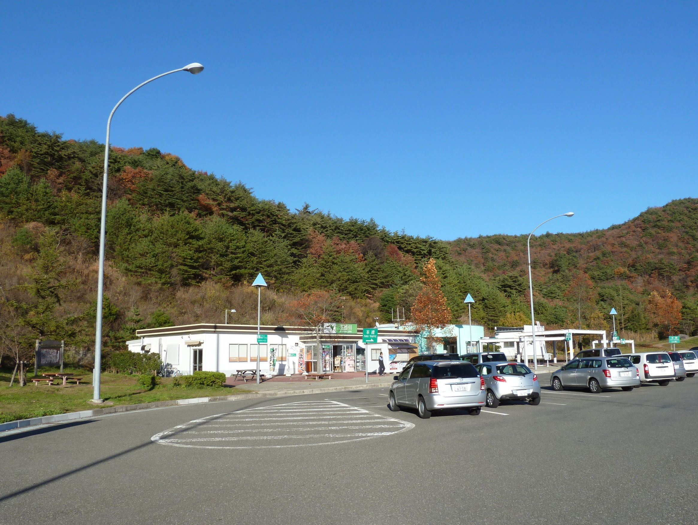 磐越自動車道 五百川パーキングエリア（上り車線）